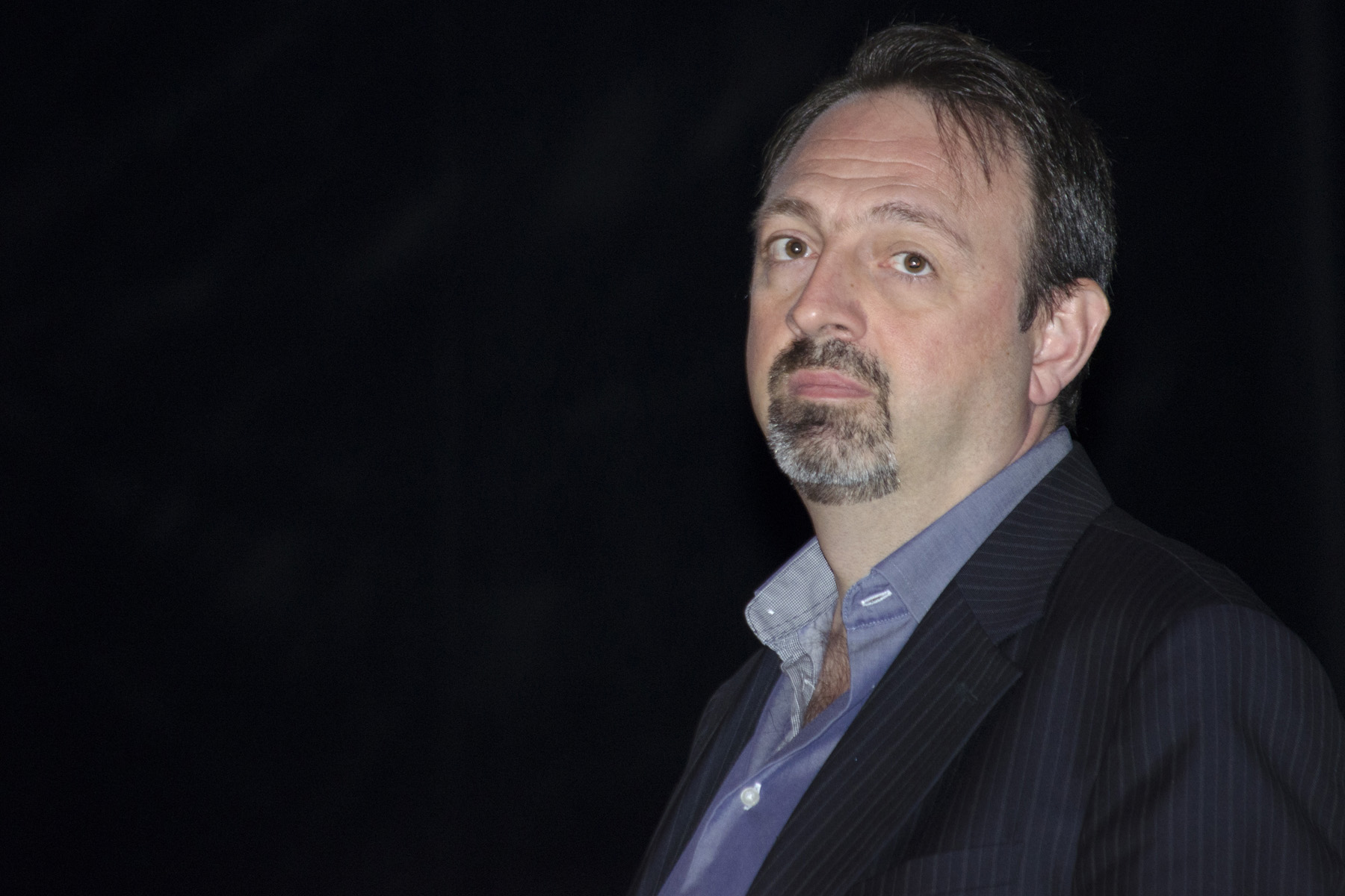 Bioinformatician Yves Moreau at ISMB/ECCB 2017